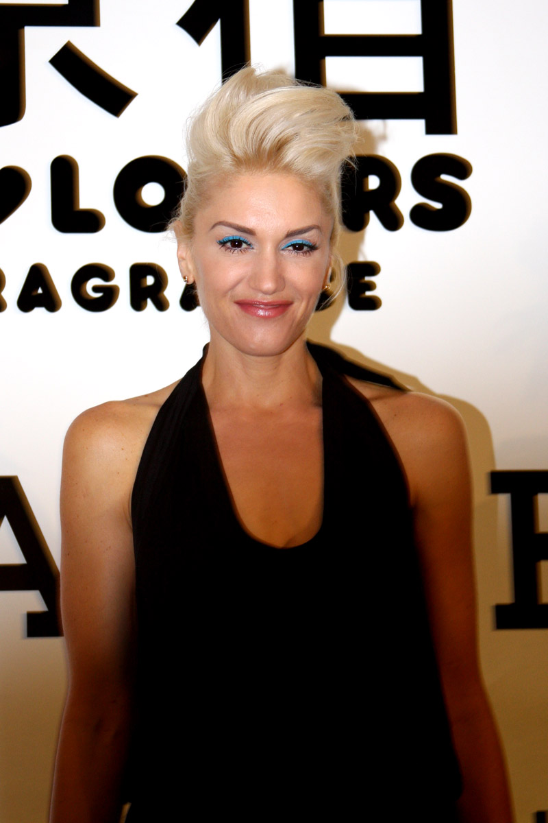 Gwen Stefani, Bloomingdales